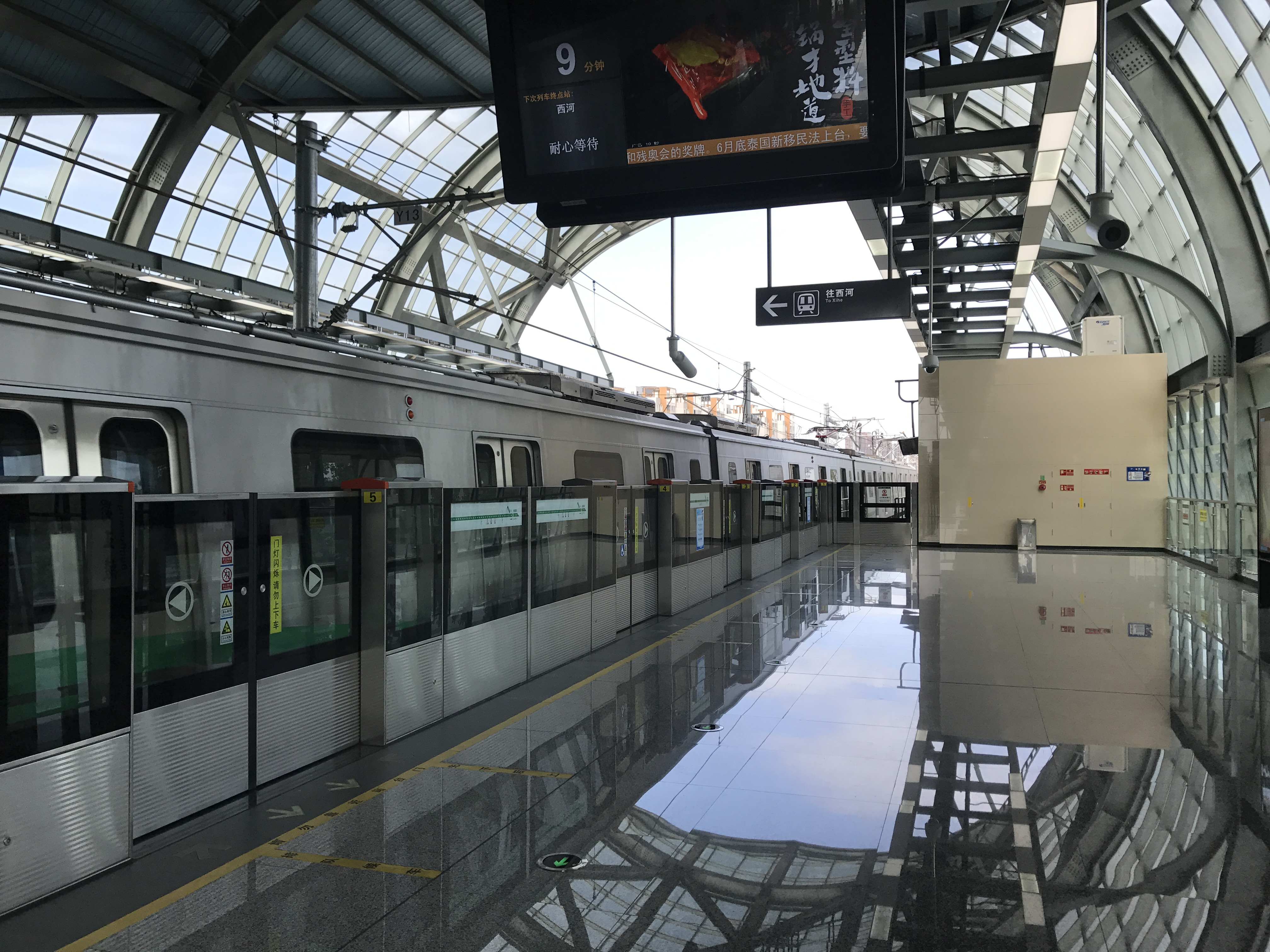 成都地铁明蜀王陵站站台层